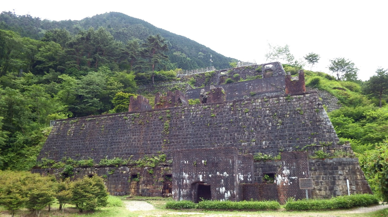 東平貯鉱庫跡と東平索道停車場跡